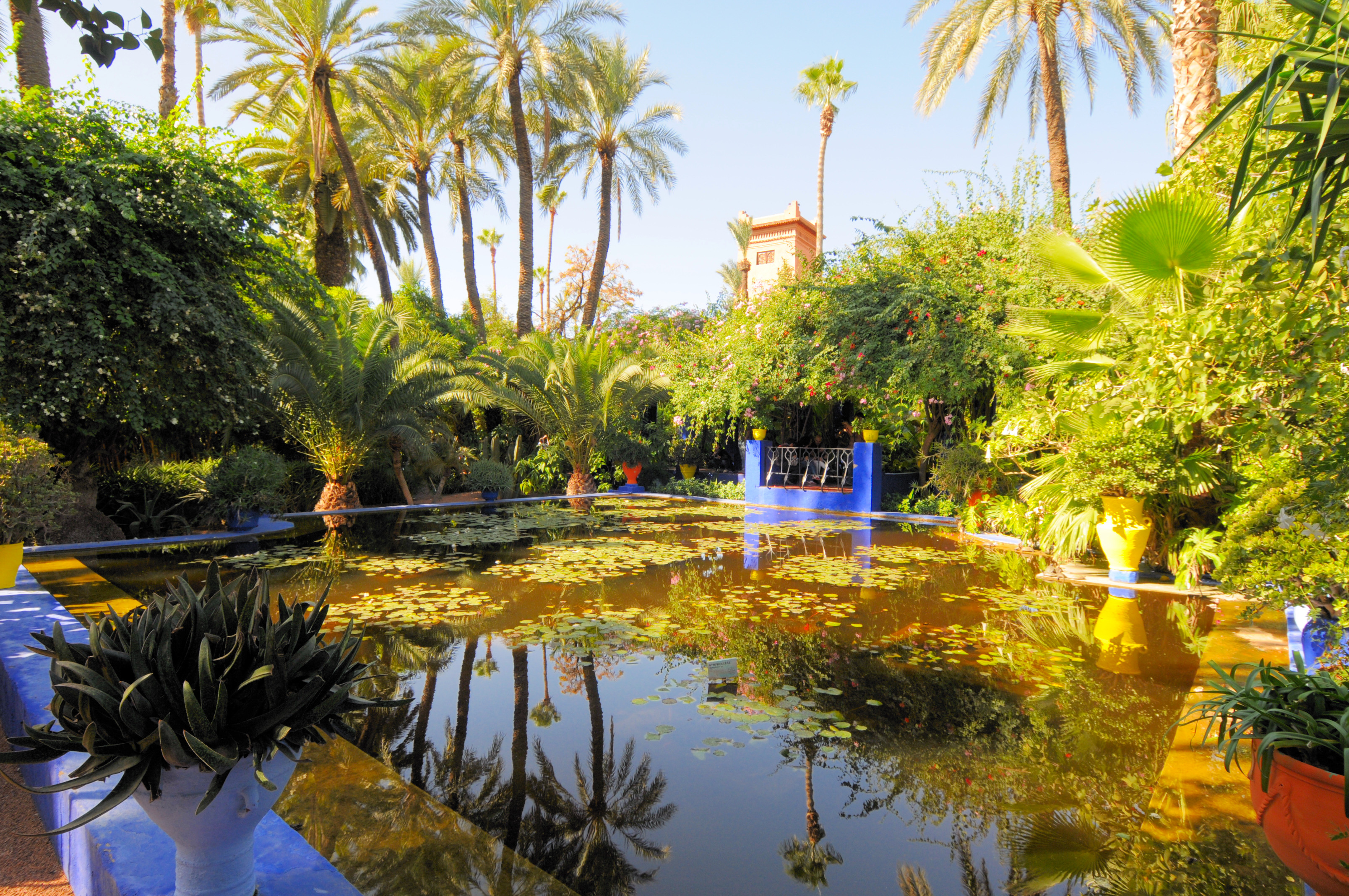 Le_jardin_des_majorelle_40.JPG Marrakch maroc